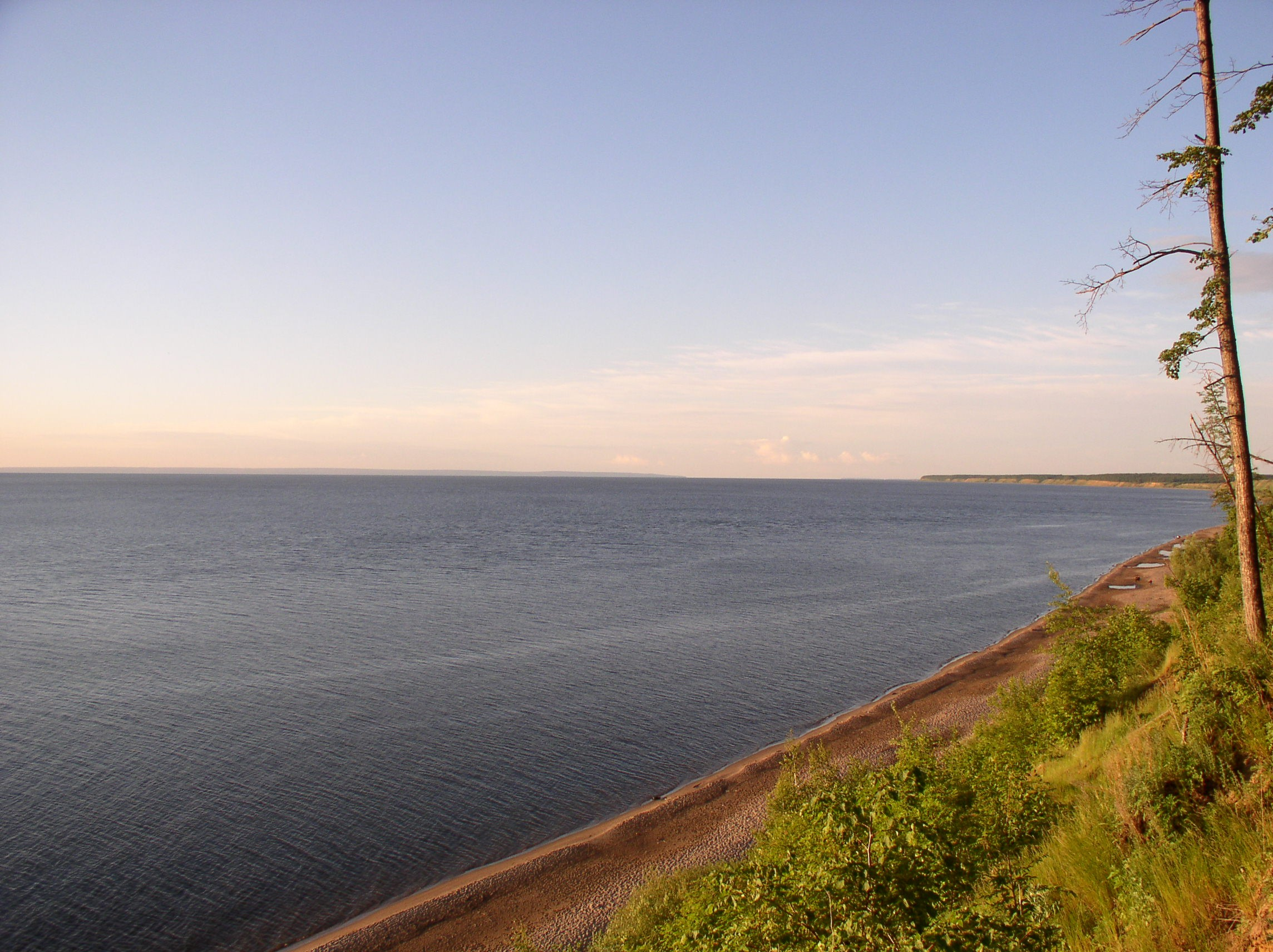 Река Волга у Ульяновска